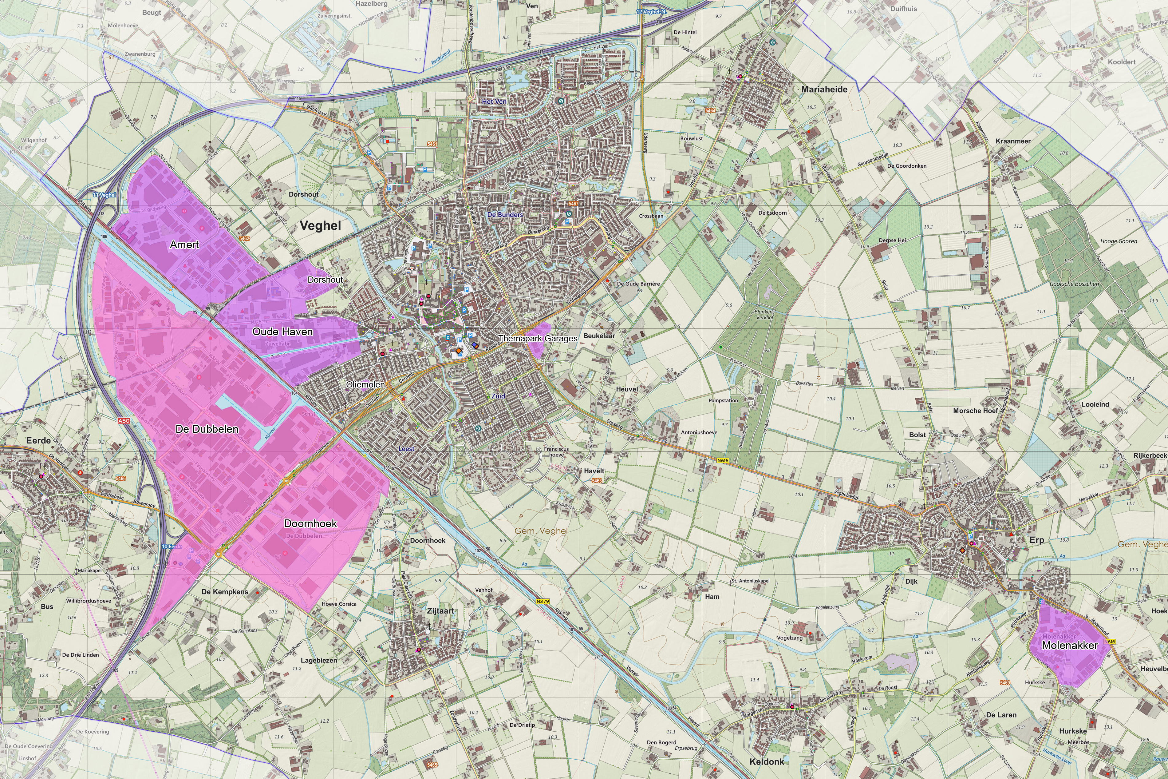 Topografische kaart van de bedrijventerreinen in gemeente Veghel, zoals vastgelegd in het Integraal Bedrijventerreinen Informatie Systeem (IBIS). Resolutie: 400 pixels/km. Kaartbeeld samengesteld uit de open geodata van de Top10NL en Top25namen (Kadaster), Creative Commons-BY licentie. Gebouwvlakken uit open geodata BAG extract. Wegen uit de OpenStreetMap, OpenStreetMap community. Reliëfschaduw uit de Actuele Hoogtekaart AHN2. Samenstelling en kleurenschema: Jan-Willem van Aalst, met QGIS. Zie ook de Legenda.